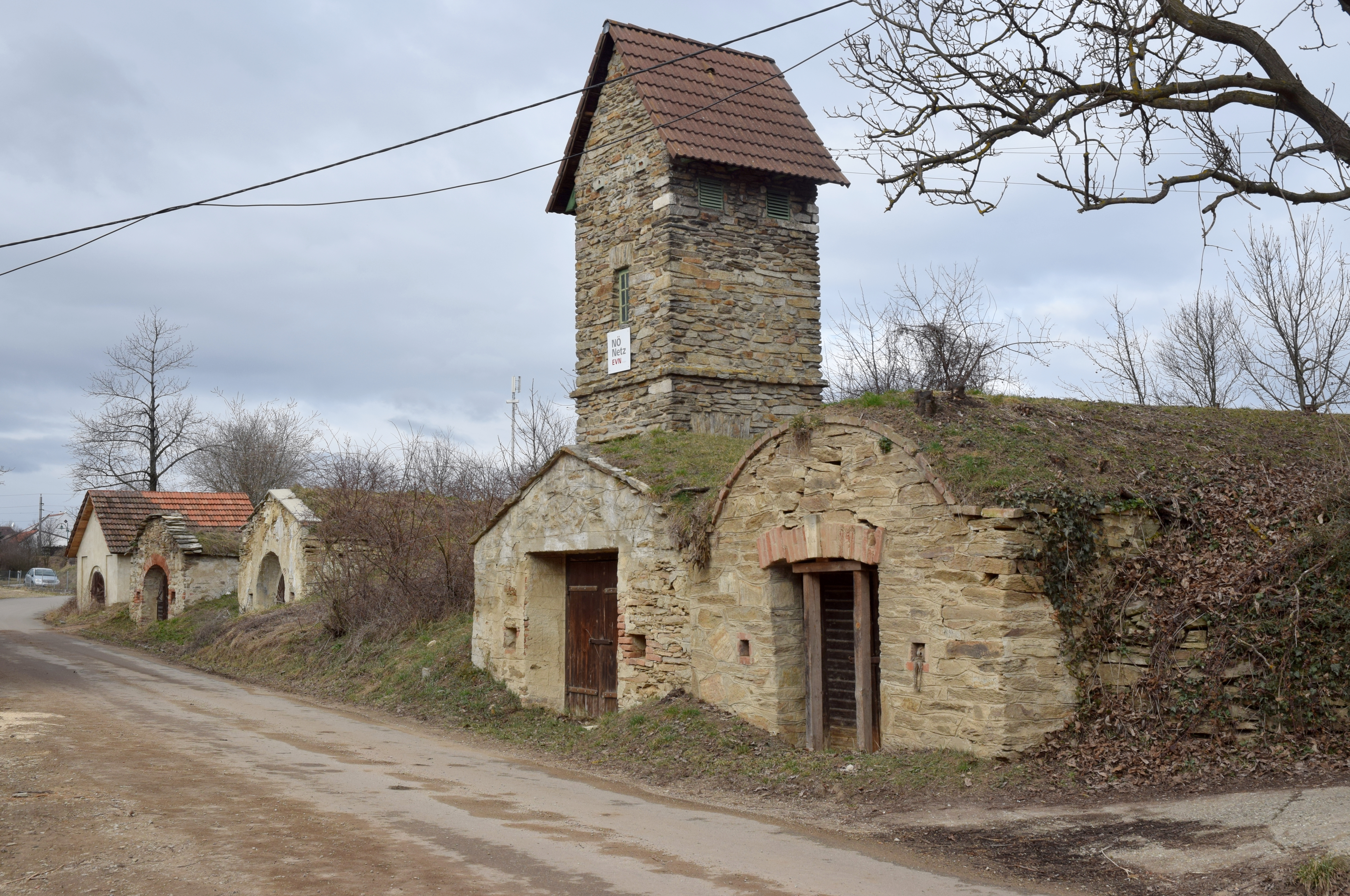 Kellergasse Nördliches Hintaus in der KG Klein-Meiseldorf in Meiseldorf